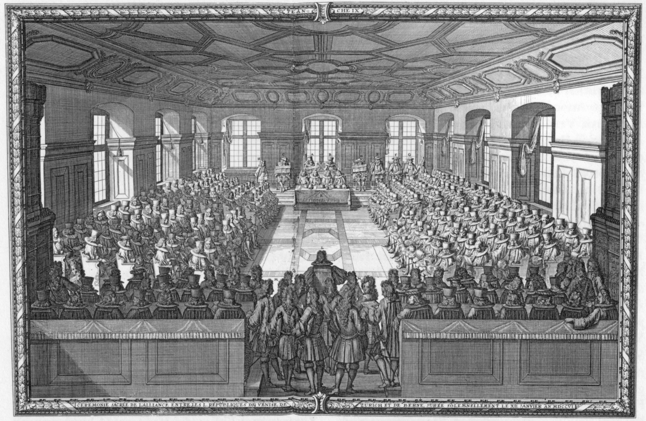 Versammlung im Ratssaal im Rathaus in Zürich anlässlich der feierlichen Beschwörung der Allianz zwischen der Republik Venedig und den Republiken Zürich und Bern am 22. Januar 1706. Der Kupferstich geht auf ein Gemälde von Johann Melchior Füssli zurück.